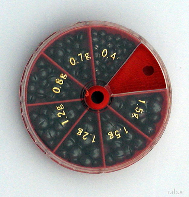 verschiedene Bleigewichte (Angelzubehör)